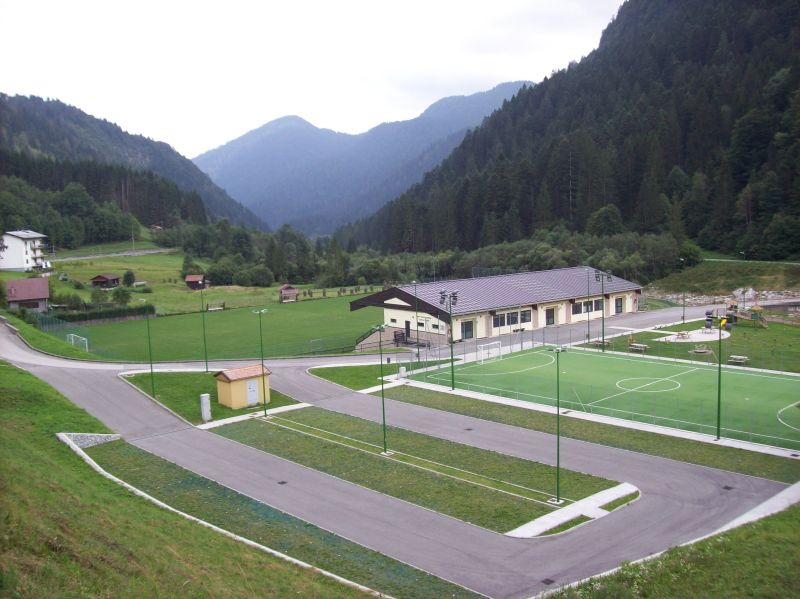 Forni Avoltri (Udine) - Italia - Il campo sportivo